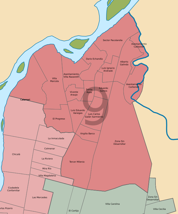 División barrial comuna 9, Neiva, departamento de Huila